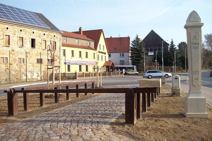 Geleitstelle mit Halbmeilensäule, Ganzmeilen- und Chausseestein Grumbach